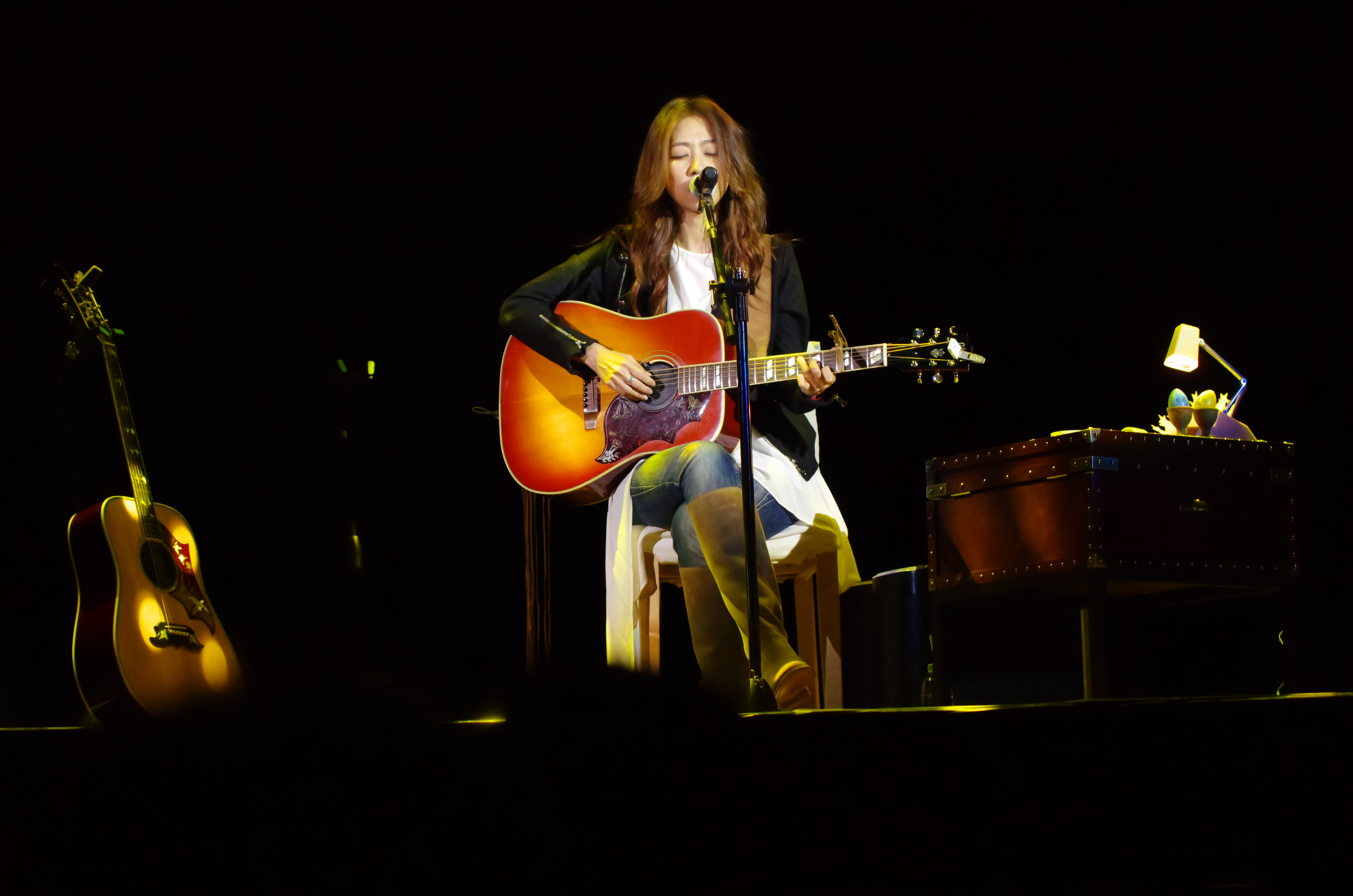 《房間裡的音樂會》香港站@匯星 Star Hall